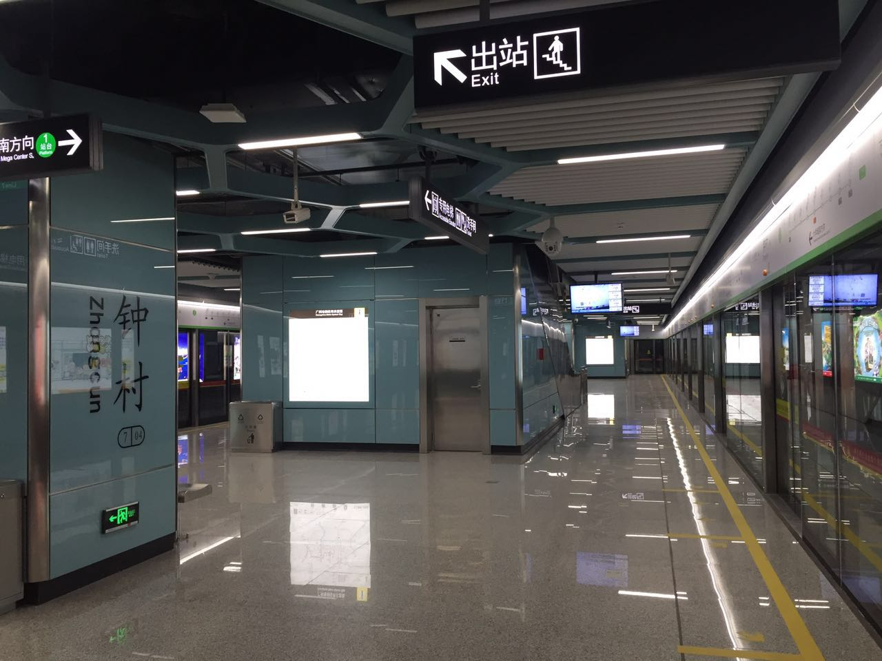 广州地铁钟村站